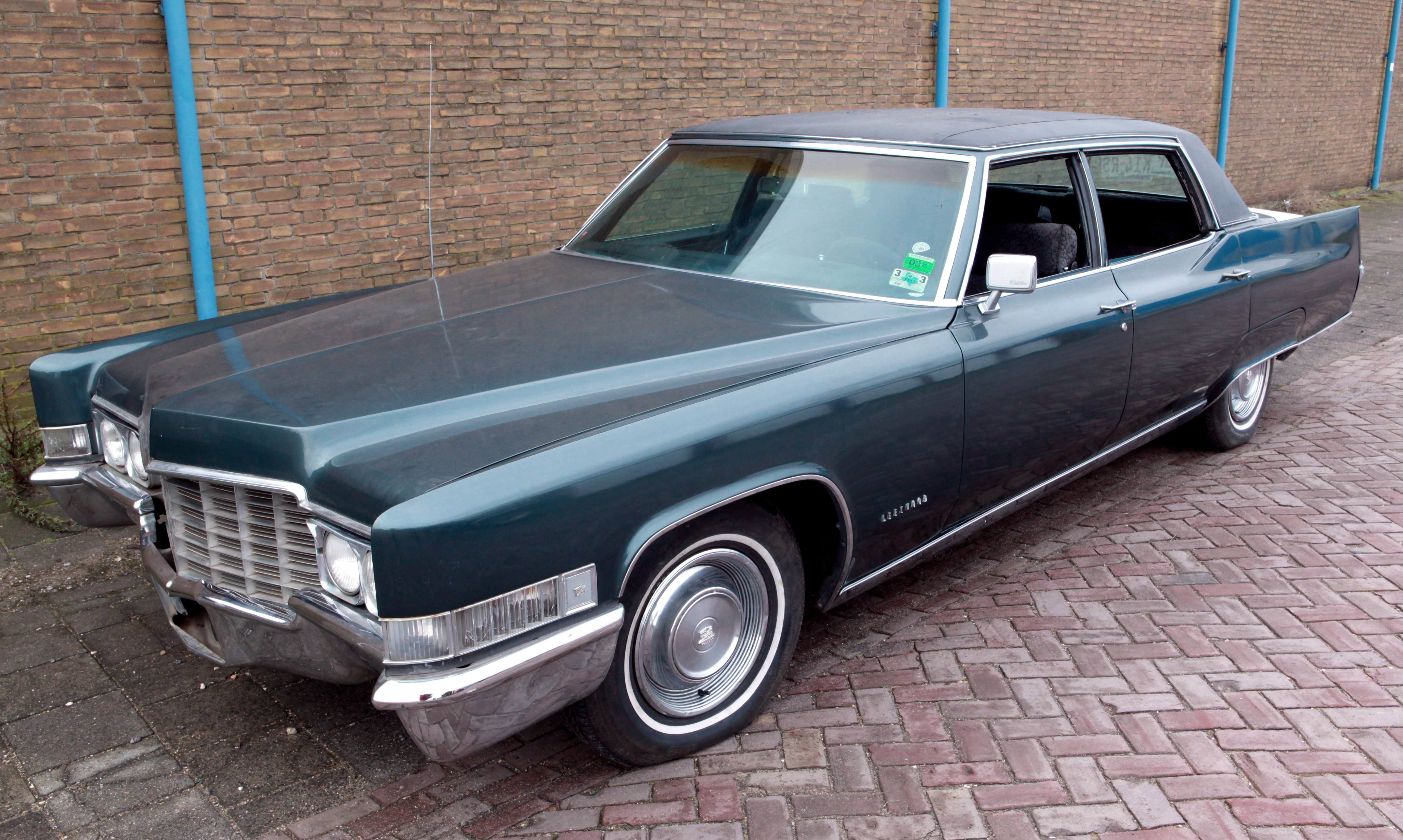 cadillac fleetwood 1969